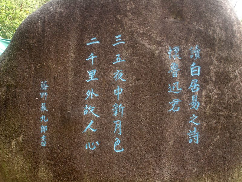 藤野怀鲁迅，杭州